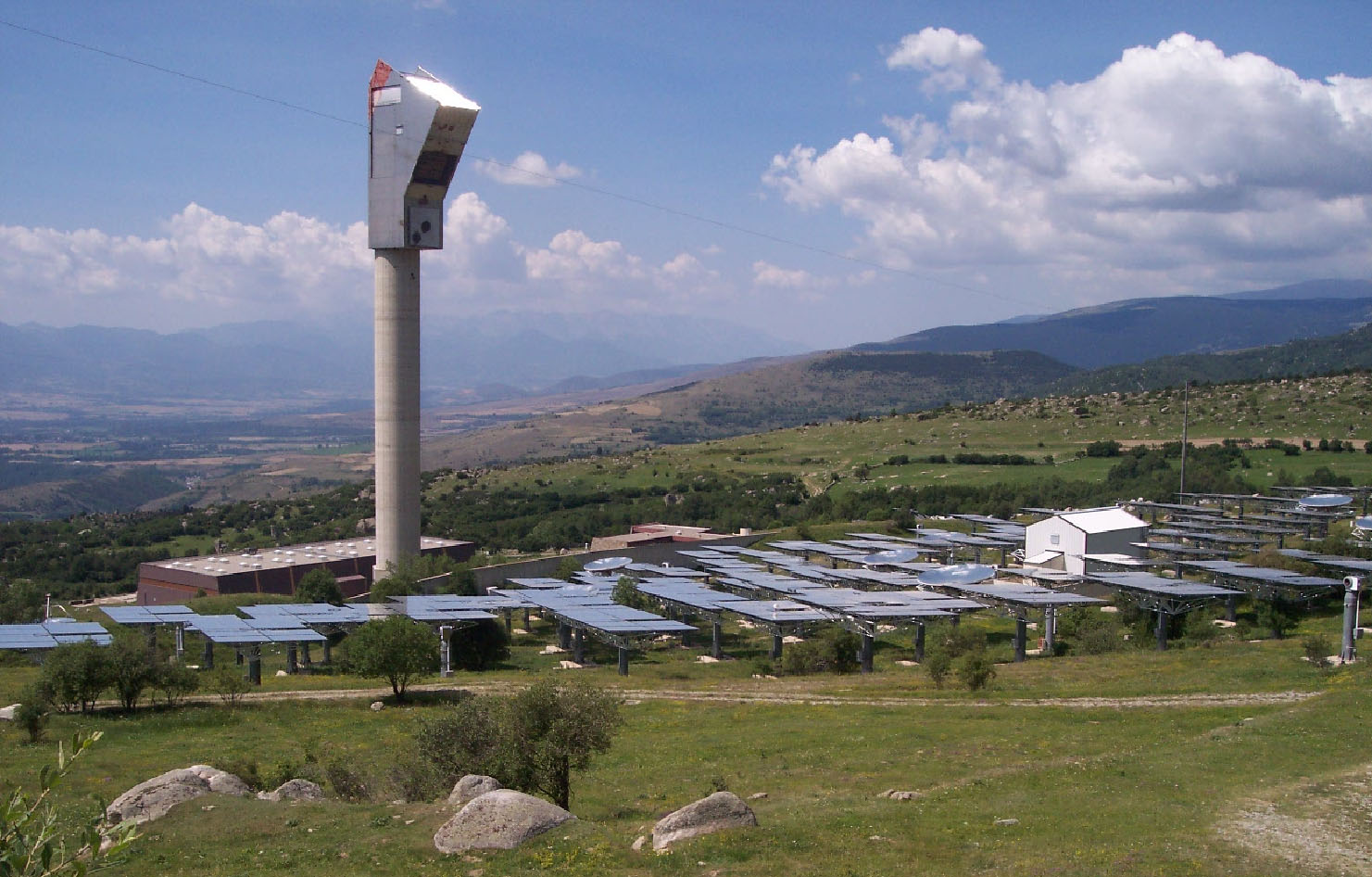 Vue globale sur la centrale solaire Thémis